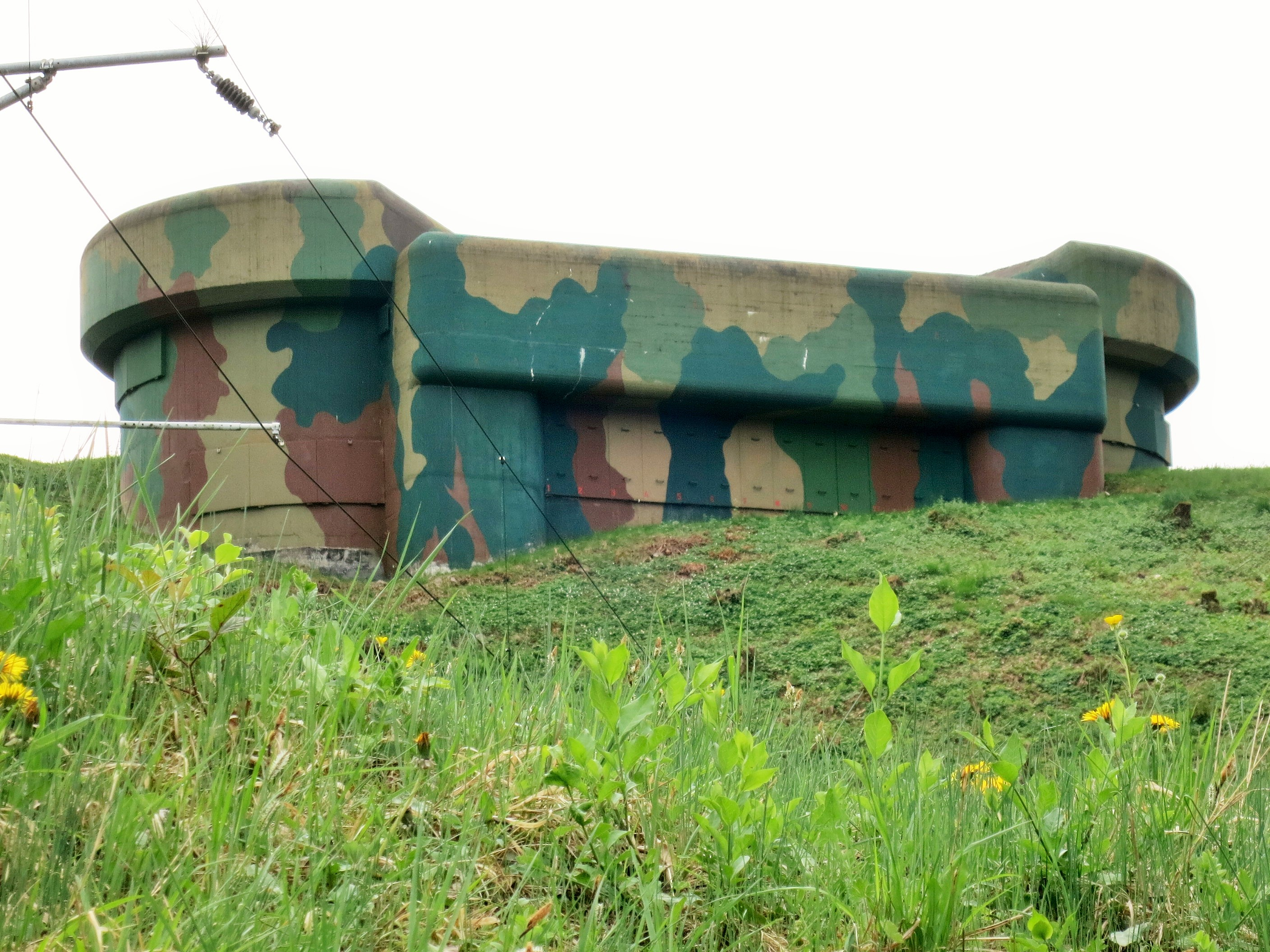 Sperrstelle Koblenz AG, Schweiz